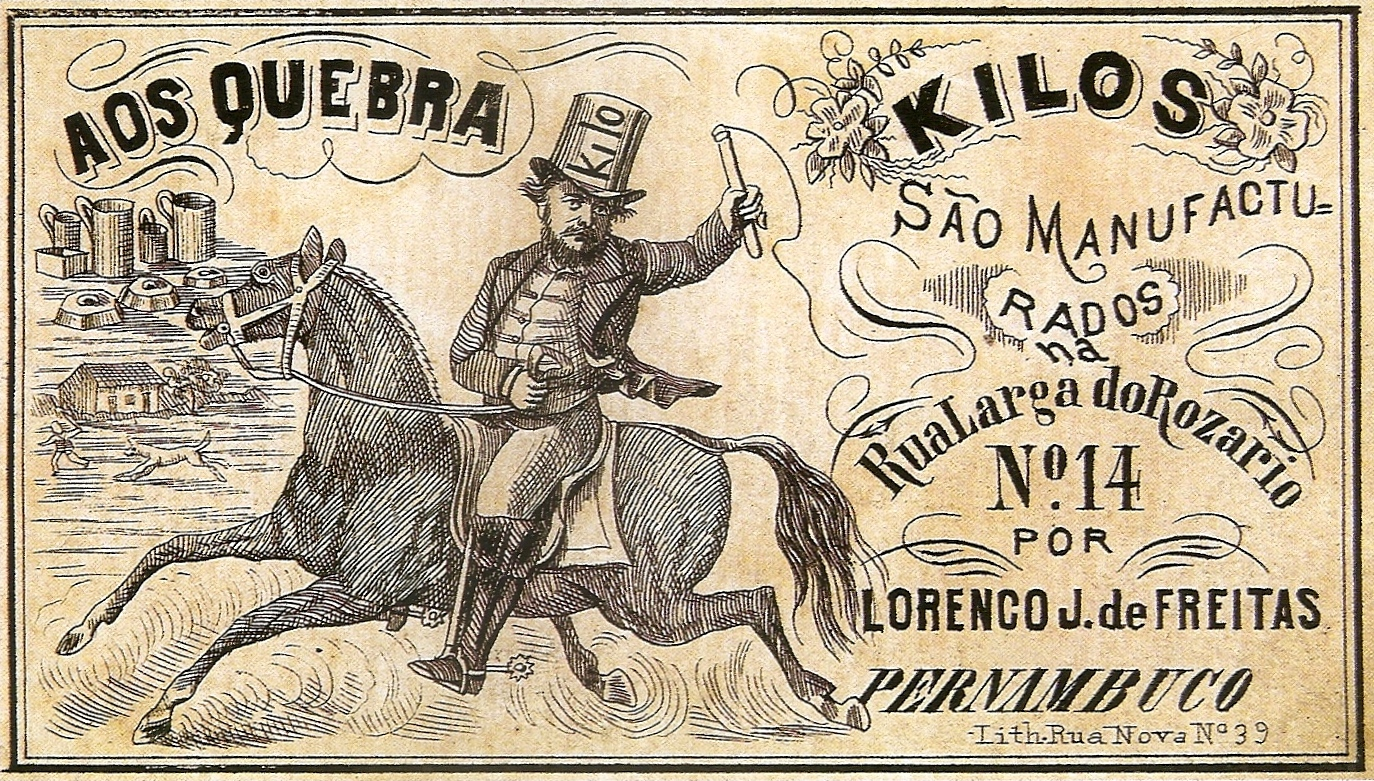 Rótulo de cigarro. Litografia, fim do século XIX. Coleção Brito Alves - Acervo do Museu do Homem do Nordeste - Recife, PE, Brasil.